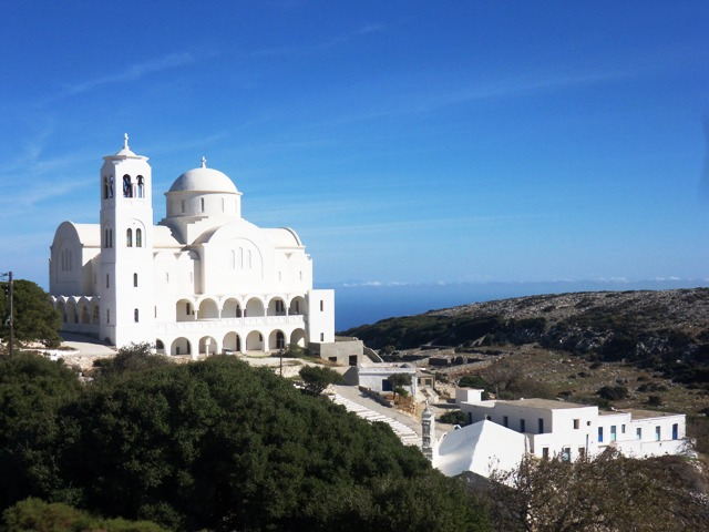 Ο νέος ναός